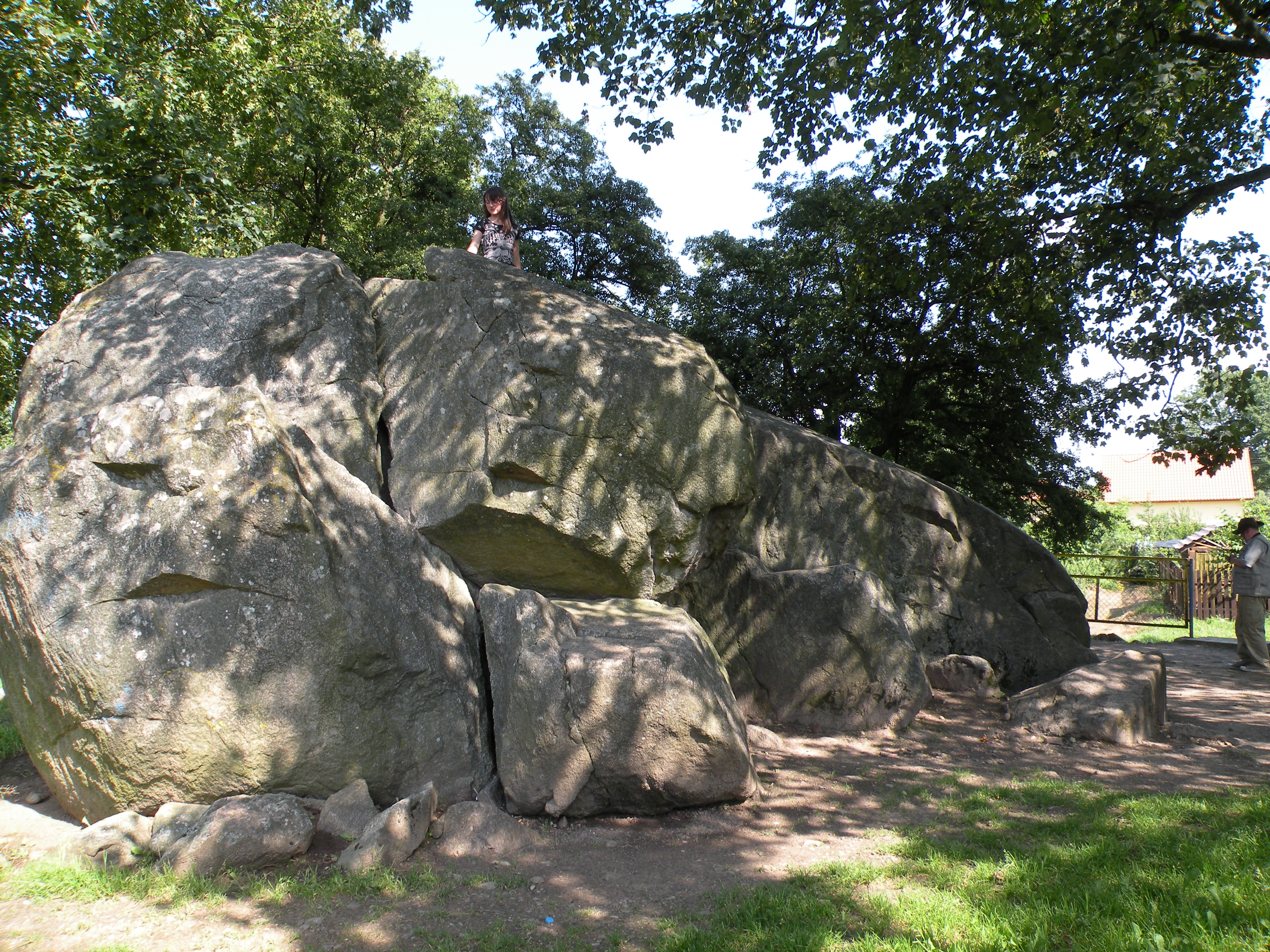 Głaz narzutowy w Bisztynku, tzw. diabelski kamień